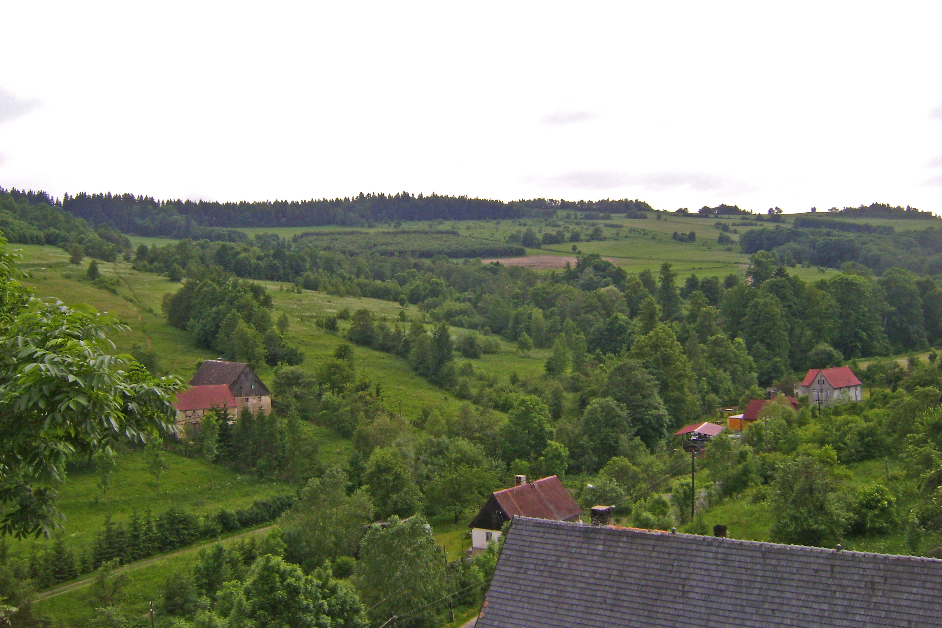 Podgórki – wieś w Polsce położona w województwie dolnośląskim, w powiecie złotoryjskim, w gminie Świerzawa, w Górach Kaczawskich w SudetachZachodnich. Zabudowania zachodniej części wsi powyżej kościoła.